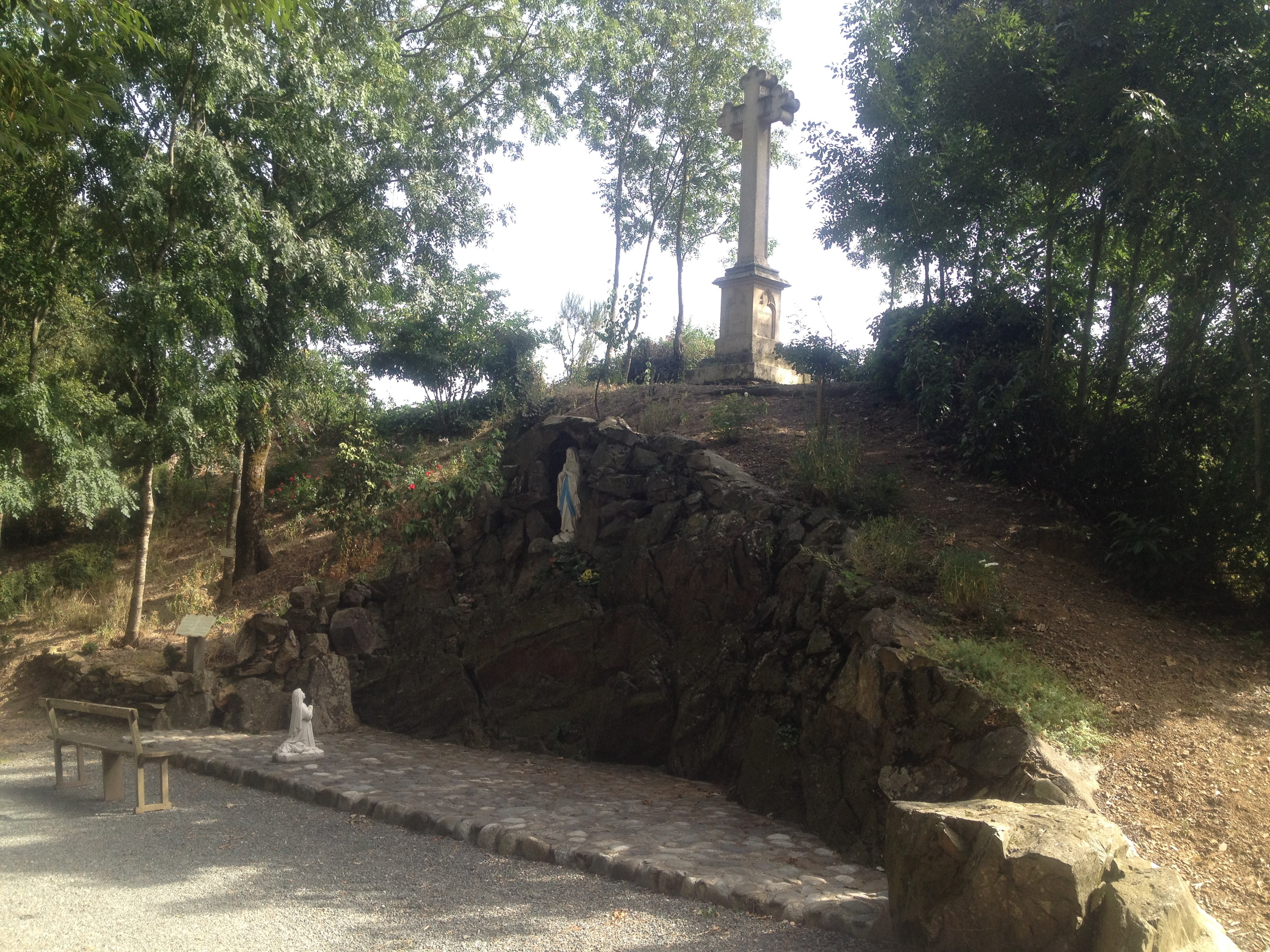 Réplique de la grotte de Massabielle à St Hilaire de Voust (Vendée, France)